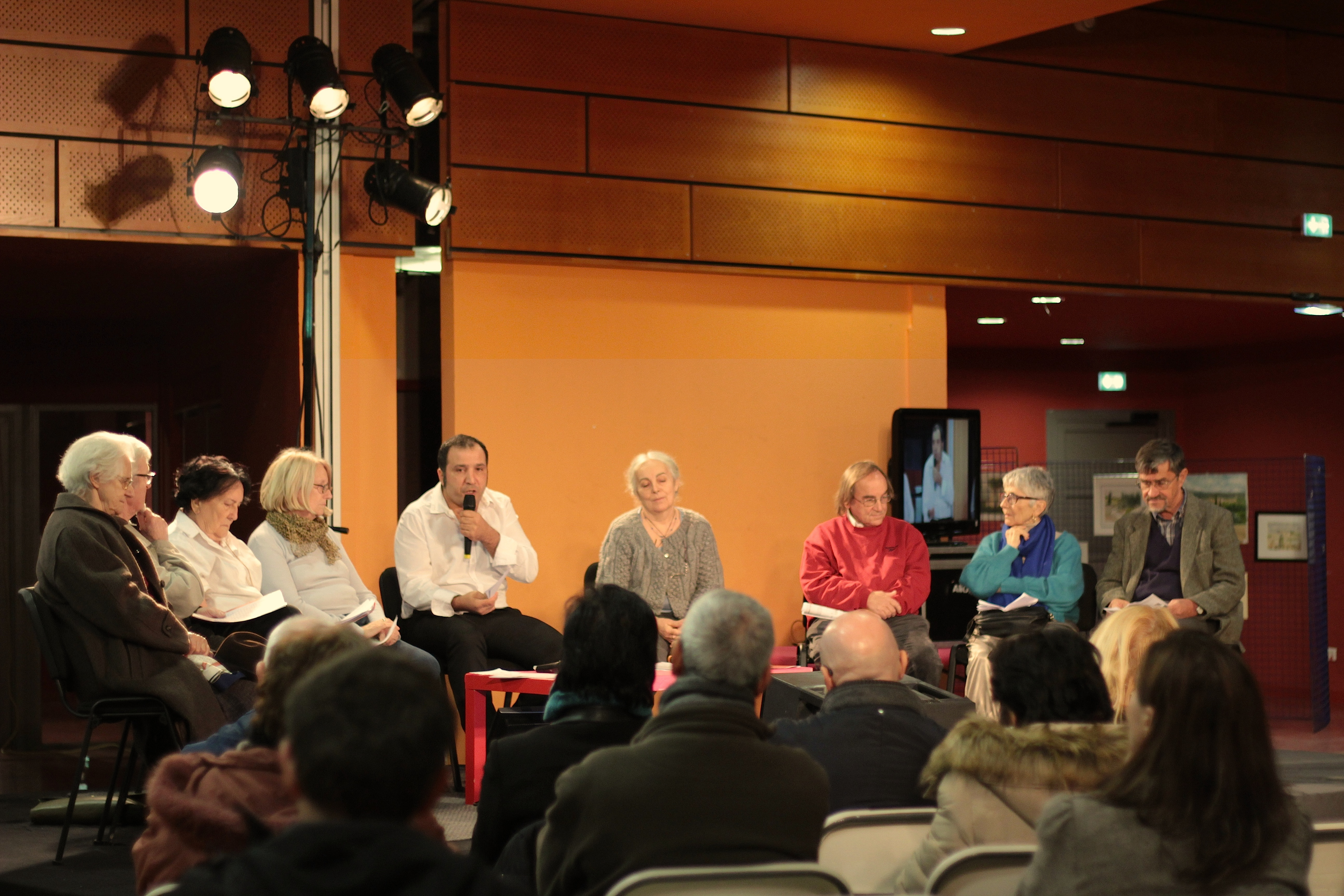 Photo prise durant le plateau télé du Memojas qui a eu lieu le 3 Décembre 2014